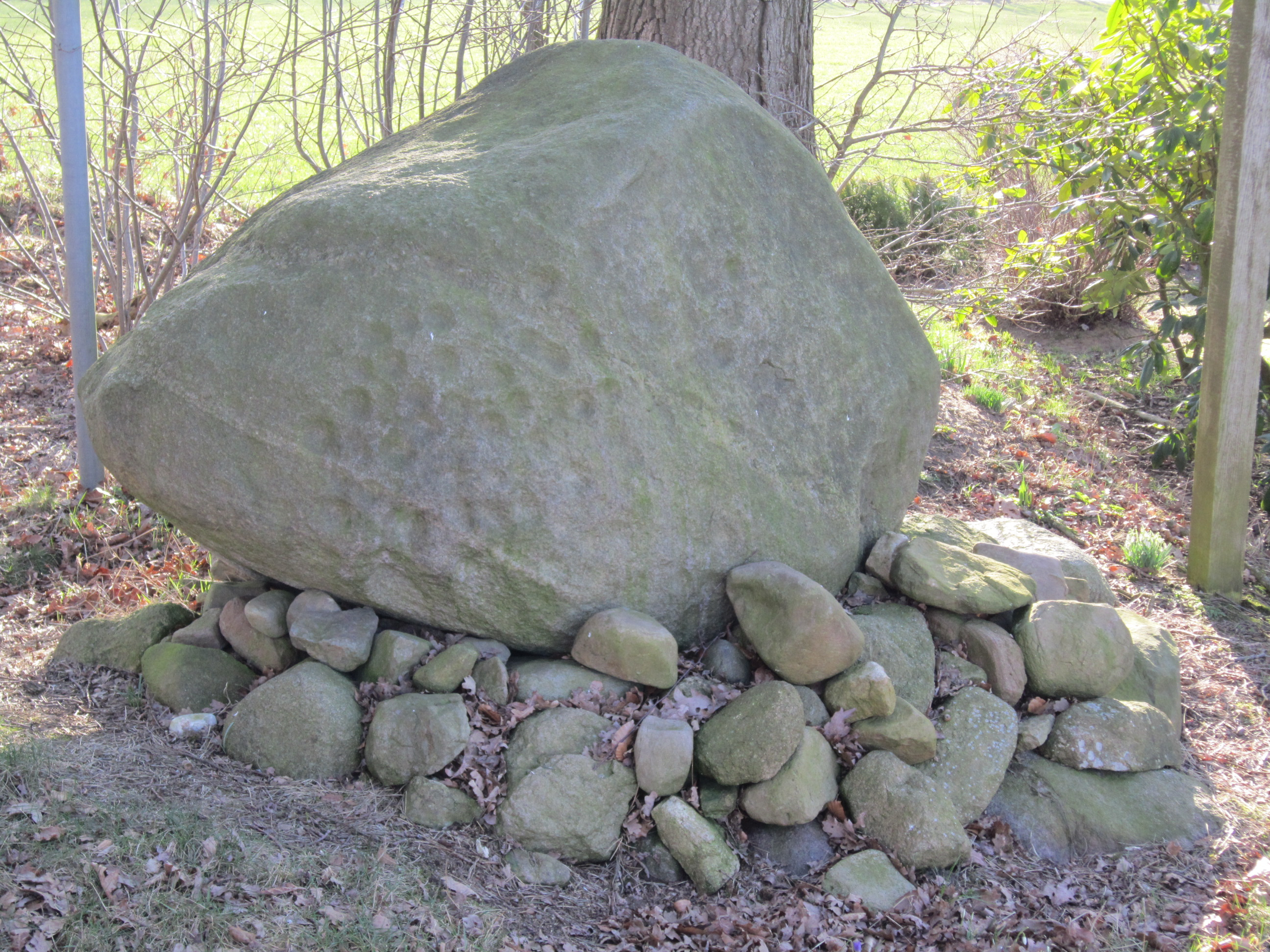 Näpfchenstein in Restrup (Gemeinde Bippen, Landkreis Osnabrück). Station der "Straße der Megalithkultur"